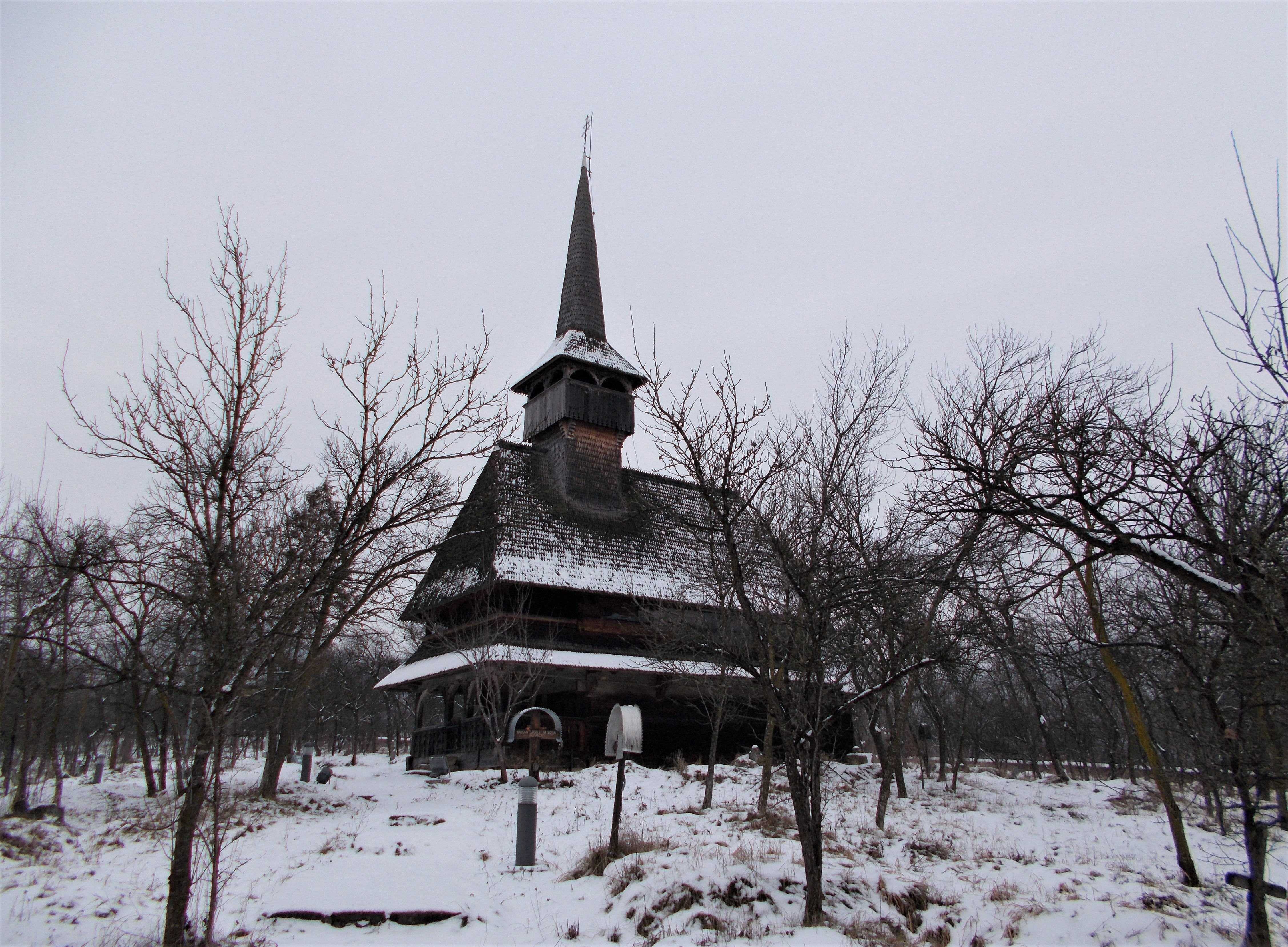 Biserica de lemn "Intrarea Maicii Domnului în Biserică" din satul Bârsana, județul Maramureș